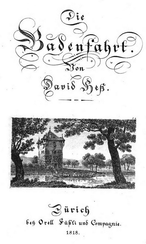 Titelblatt des Buchs «Die Badenfahrt» von David Hess.